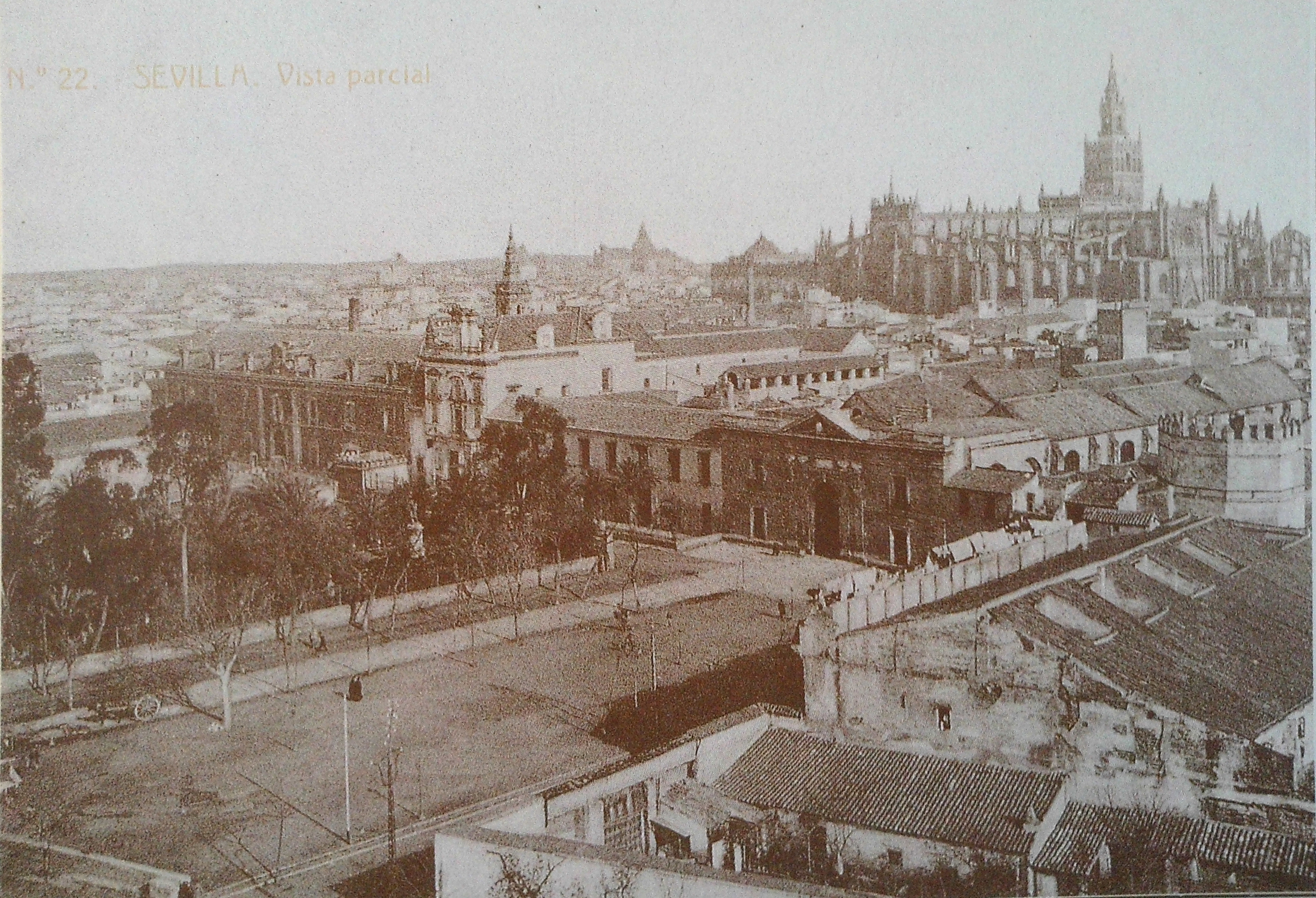 Sevilla. Vista parcial